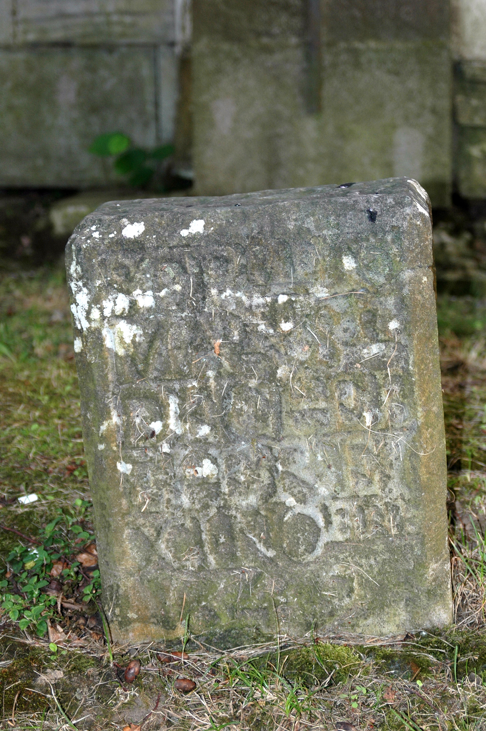 Larressore, stèle tabulaire. Photo prise le 08/08/06 par Harrieta171